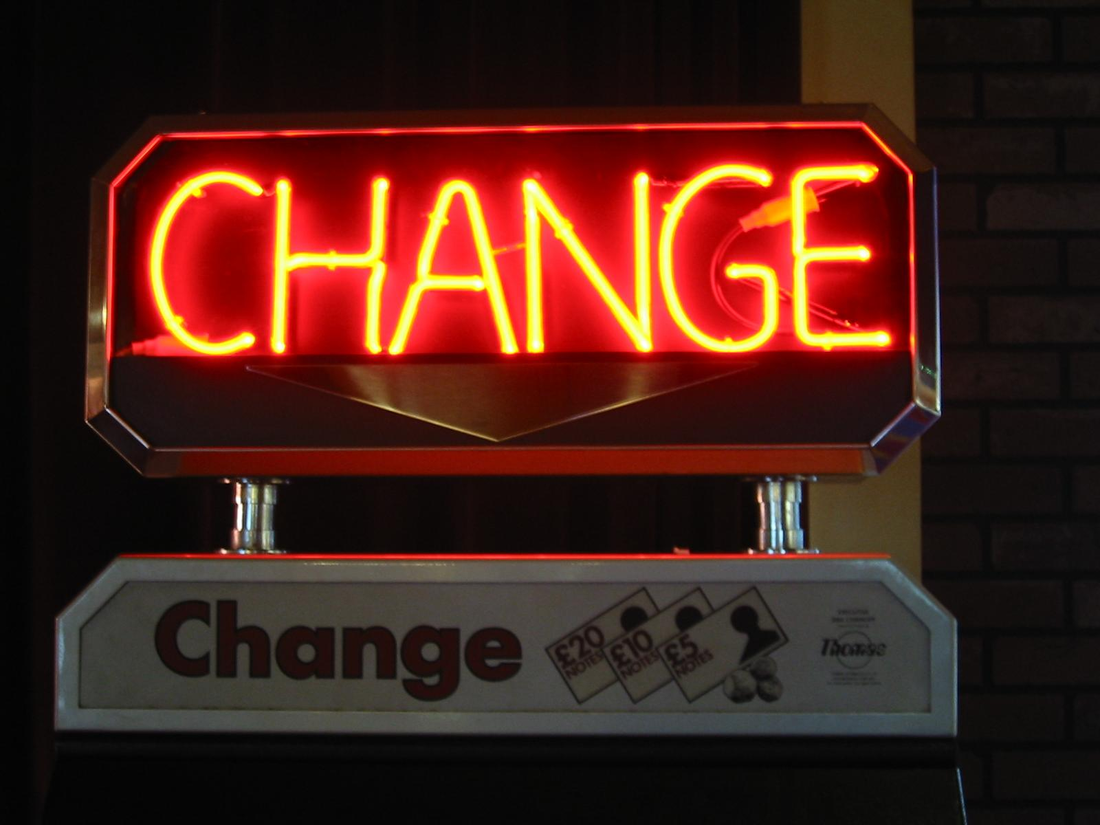 ChangeChange